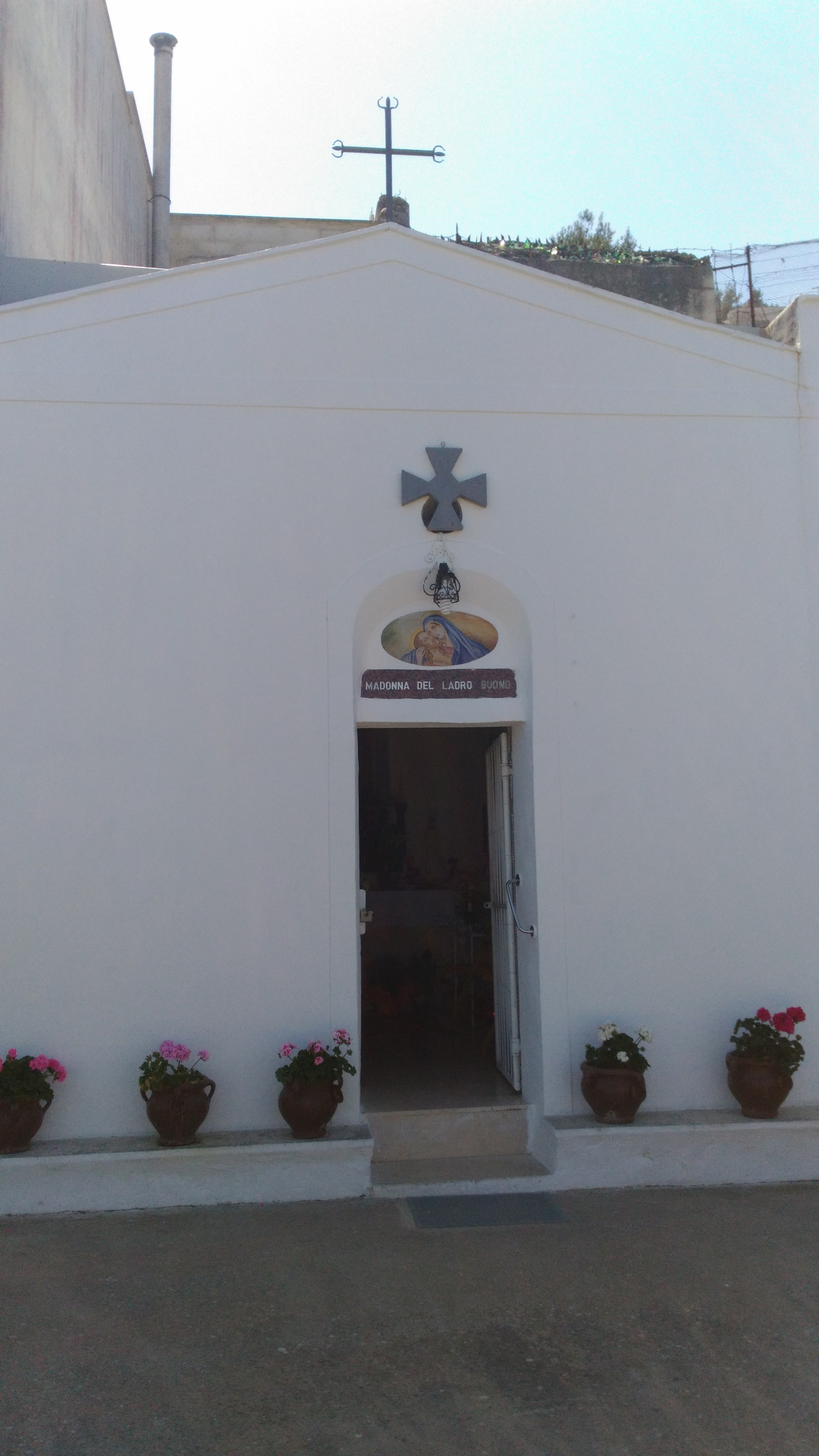 Chiesa madonna di Lu Tribonu